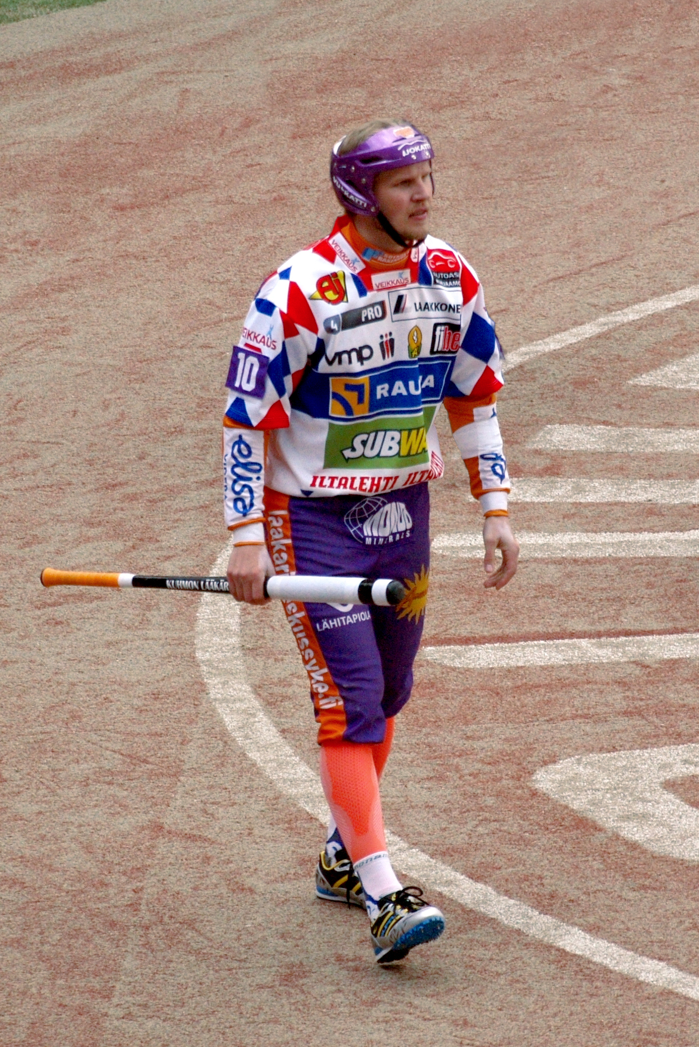 Roope Korhonen ottelussa Vimpelin Veto - Sotkamon Jymy (19.7.2015)